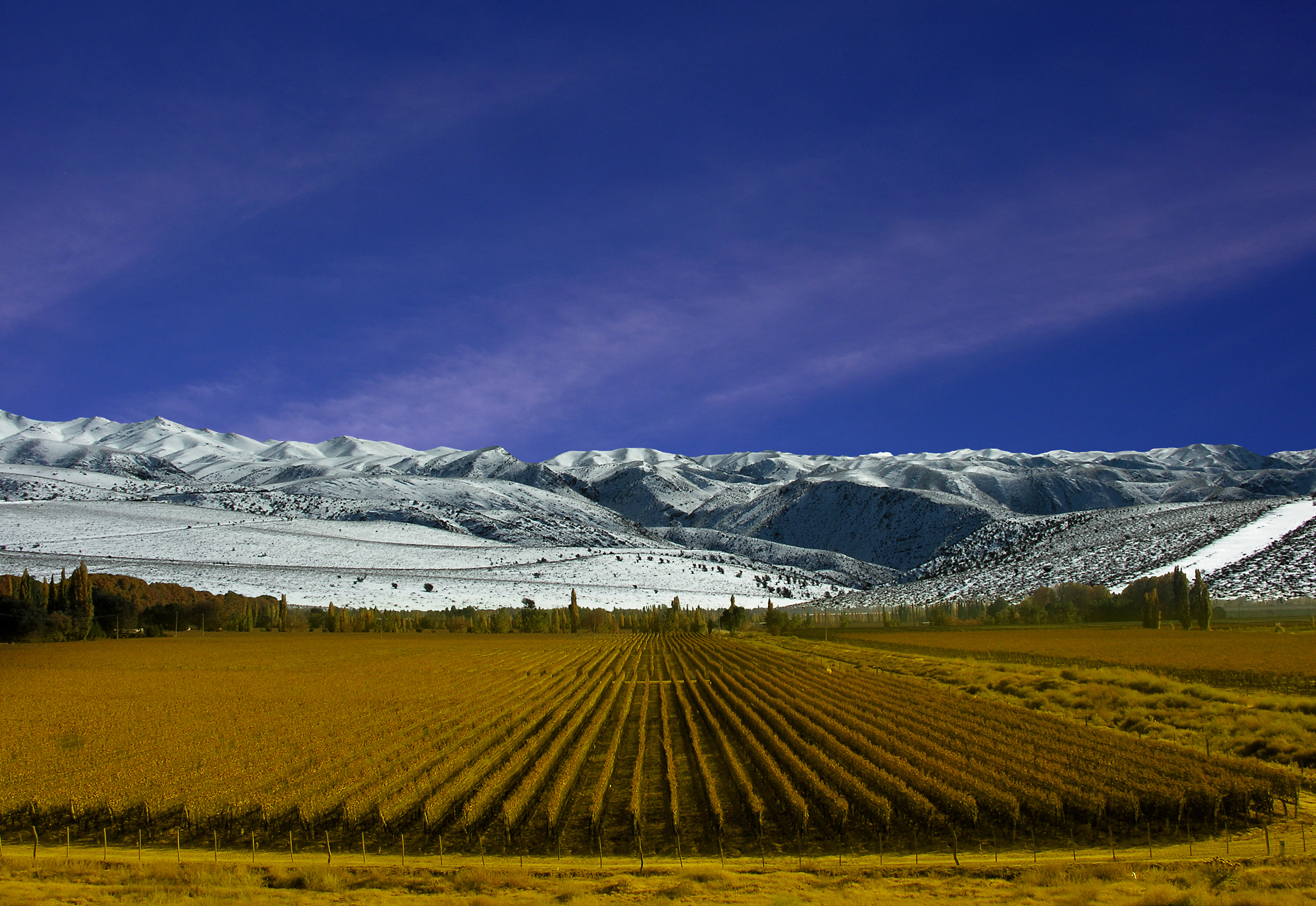 Vineyard in Mendoza Province, Argentina.